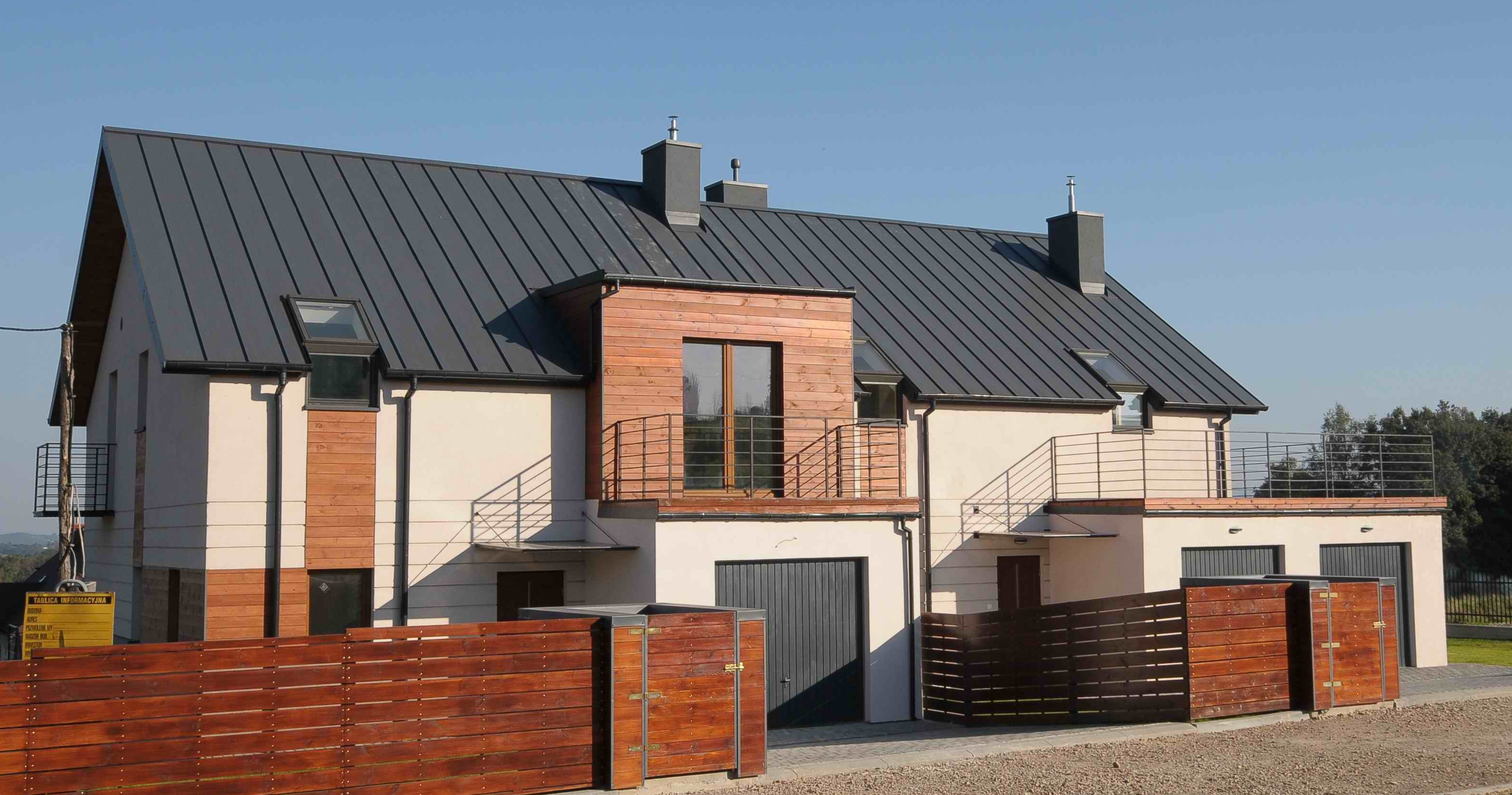 Gotowy dom w technologii SCS, okolice Wieliczki